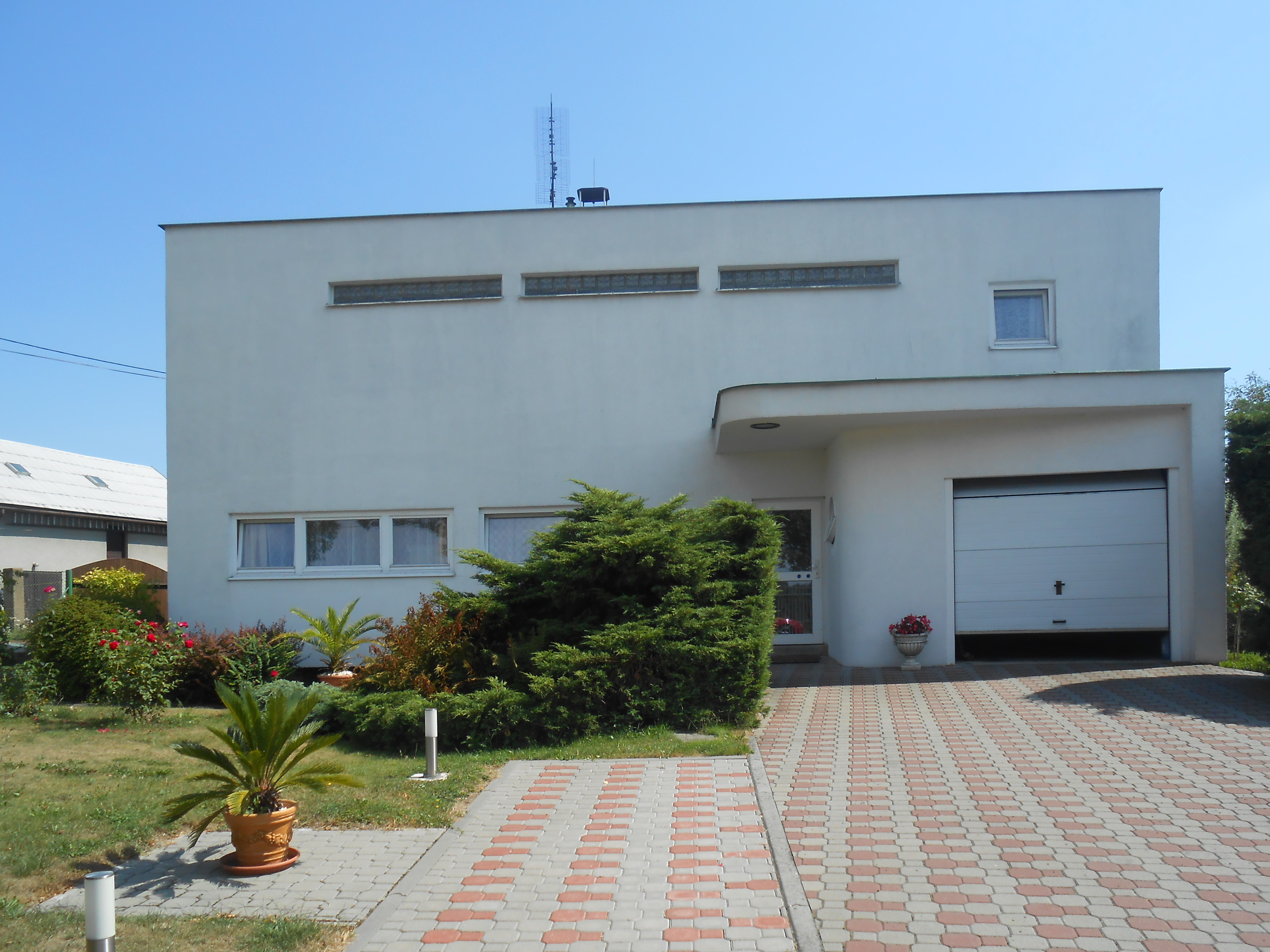 Hlučín, Kremerova vila, ul. Čs. armády 762/10